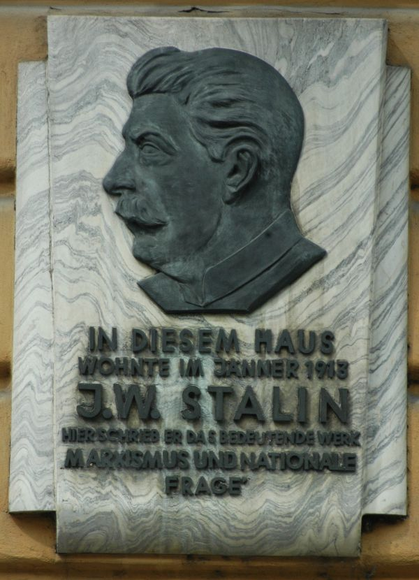 Gedenktafel aus der Besatzungszeit an einen Wien-Aufenthalt von Josef Stalin im Jahr 1913. Adresse: Schönbrunner Schloßstraße 30, 1120 Wien